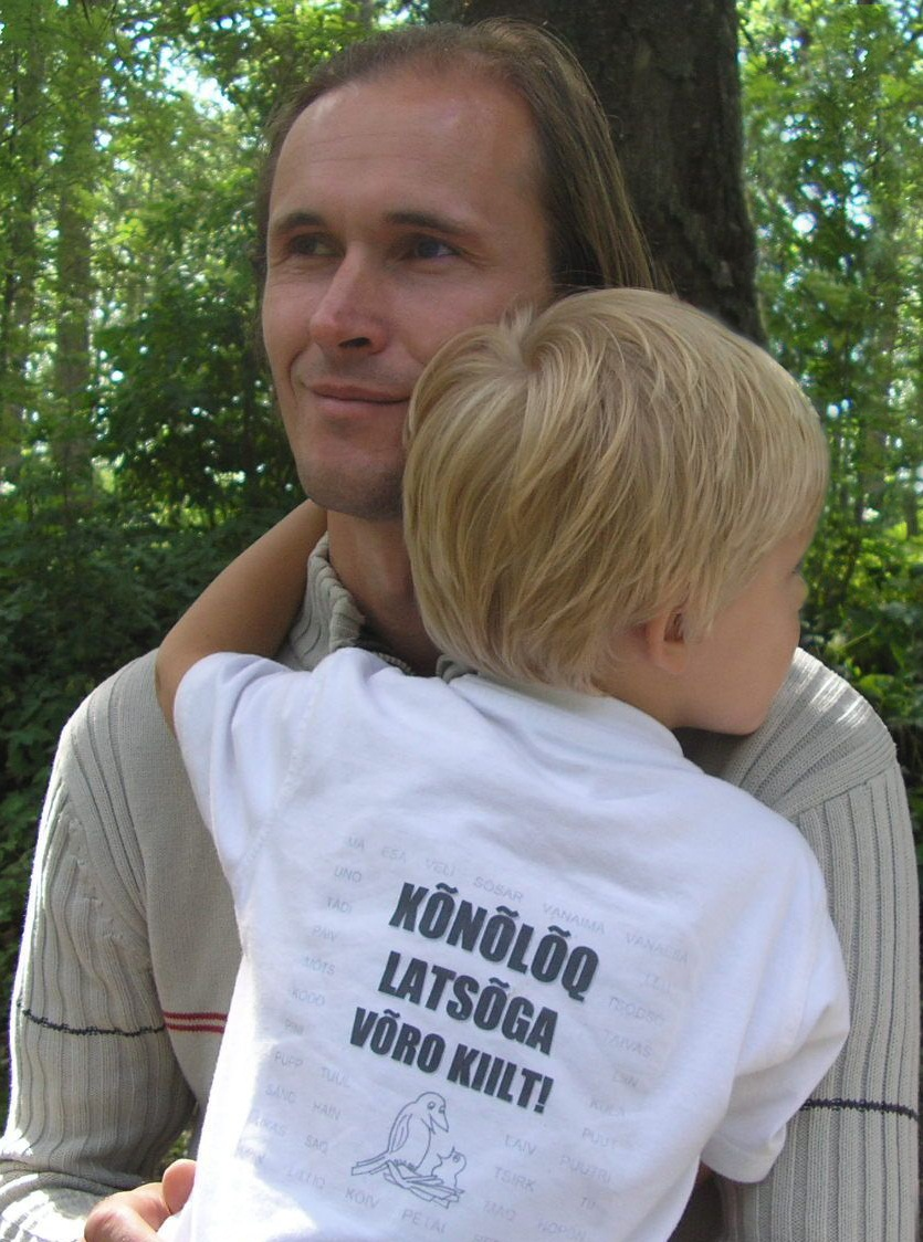 Jüvä Sullõv ehk Sulev Iva 2006. aasta suvel.